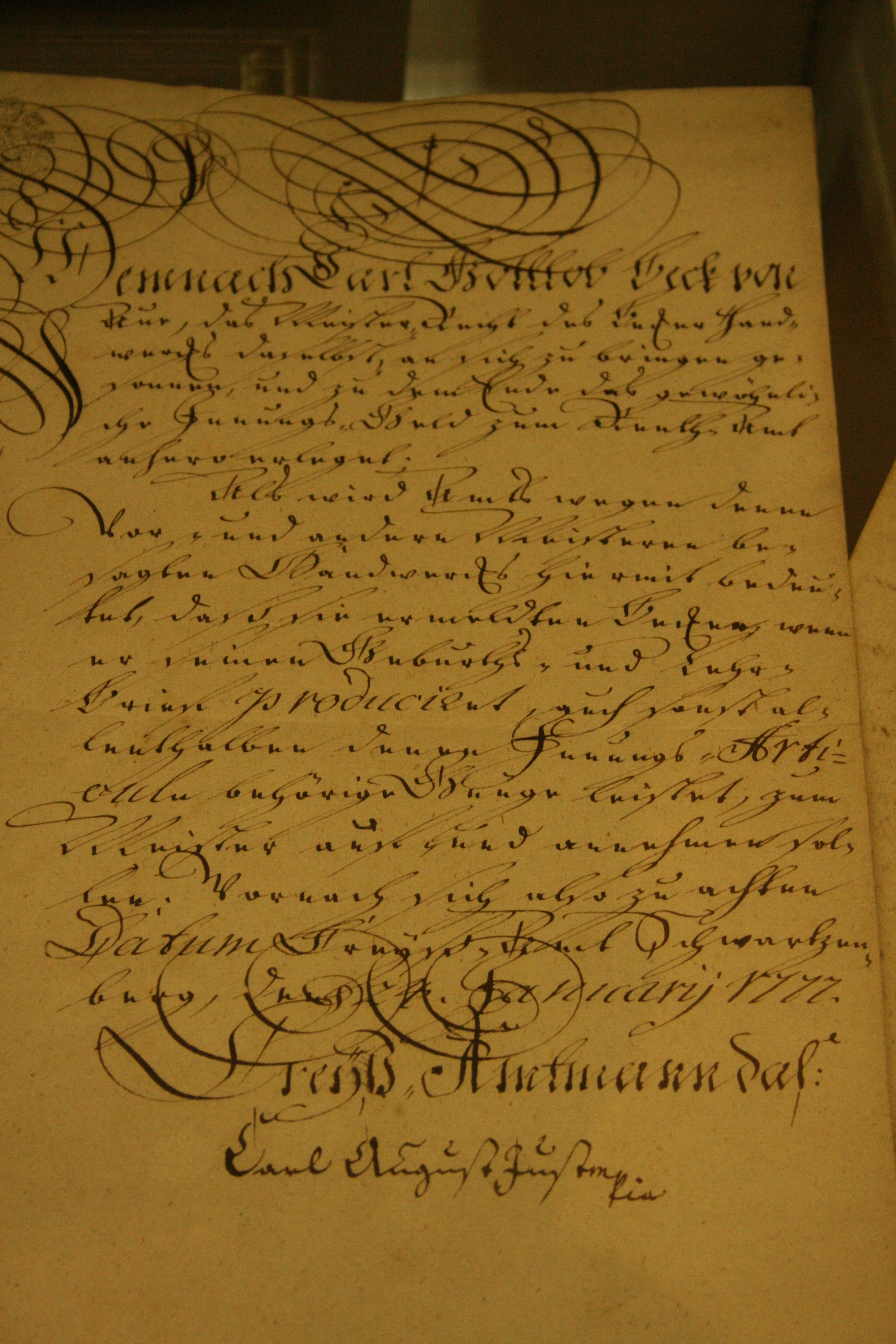 „Bestätigung des Meisterrechts für den Auer Bäckermeister Carl Gottlob Beck (!) durch den Amtmann in Schwarzenberg 1777“. Ein Exponat im Auer Stadtmuseum. Als Creyß-Amtmann, oberster Beamter des Amts Schwarzenberg und damit Repräsentant des sächsischen Kurfürsten im westlichen Erzgebirge, amtierte damals Carl August Just.